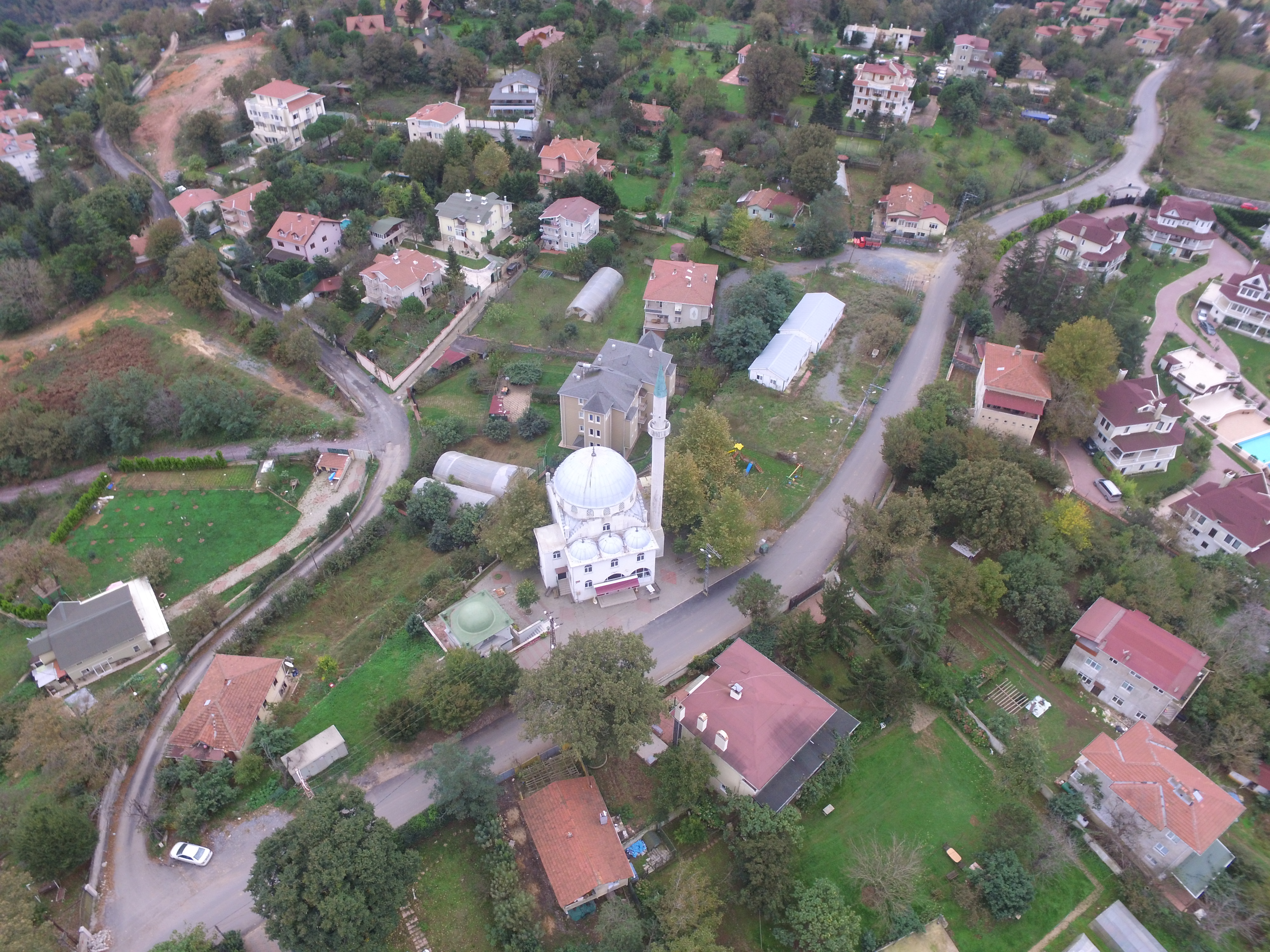 Reşadiye, Çekmeköy/İstanbul, Turkey